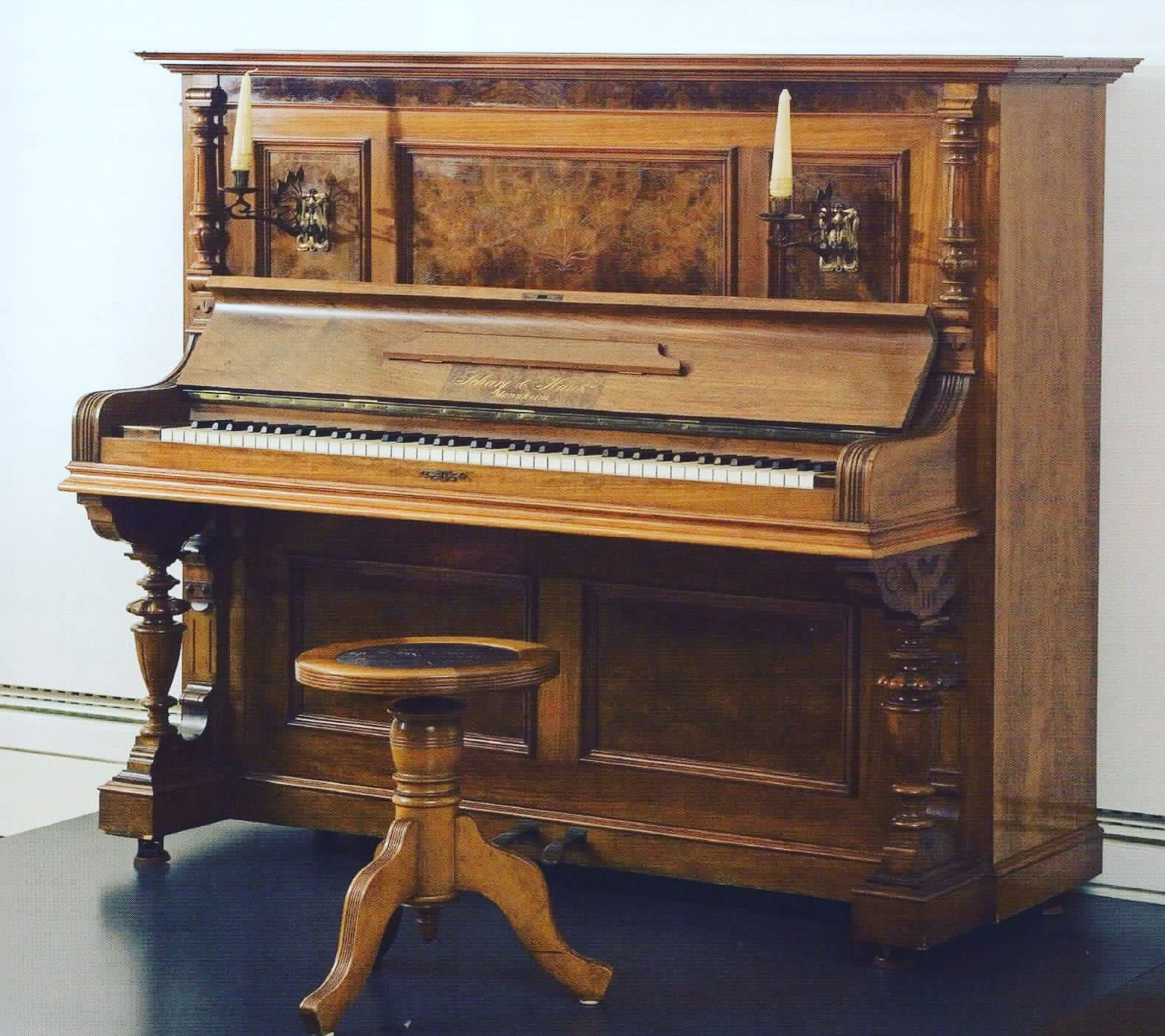 Klavier der Marke Scharf & Hauk im Museum Bassermannhaus in Mannheim (2008)